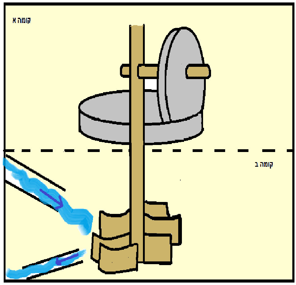 מסכרה, שחזור גלגל המים